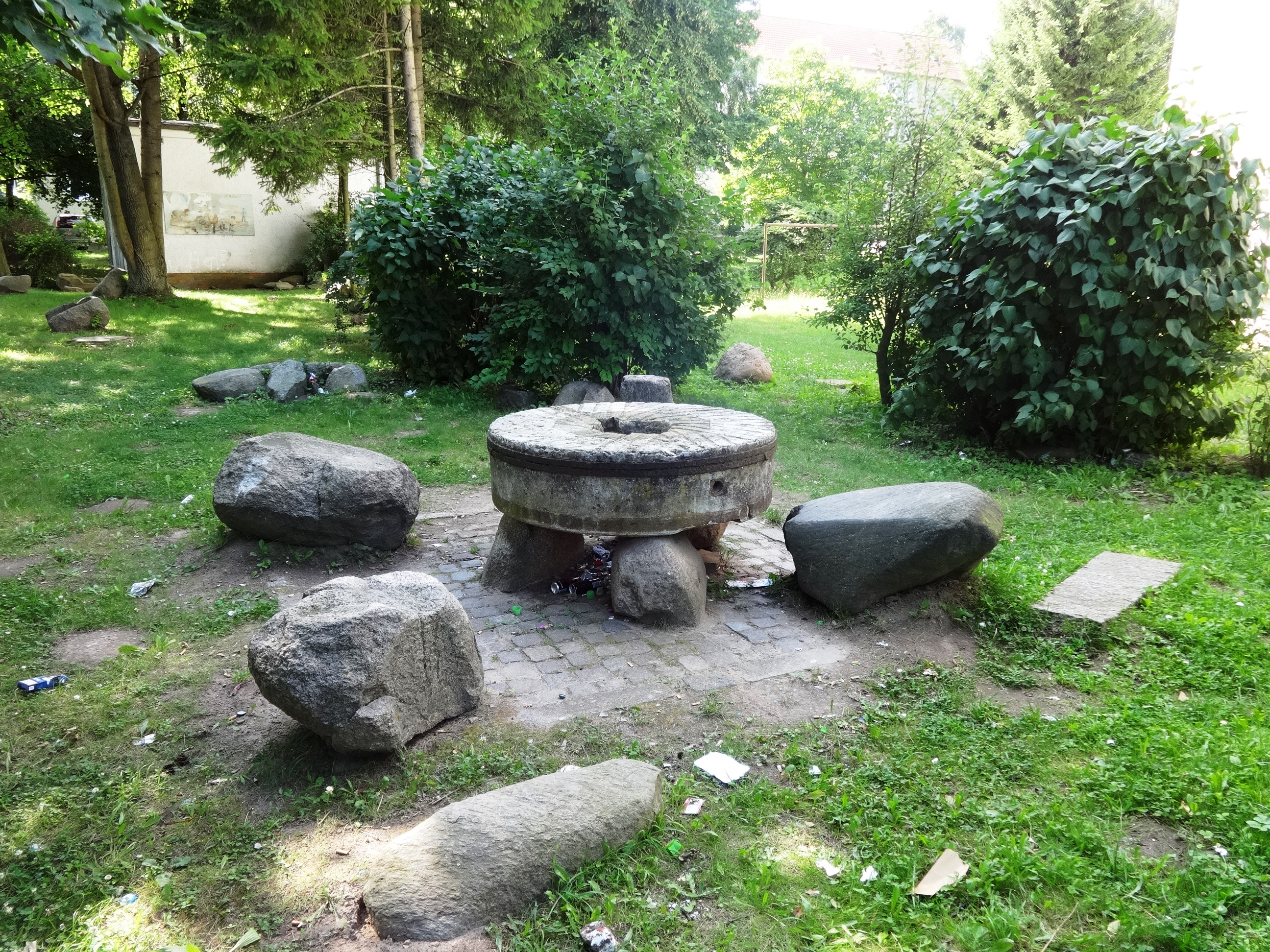 Der Mühlen-Stein-Park ist eine Parkanlage in Wolgast im Landkreis Vorpommern-Greifswald. Auf dem kleinen Gelände sind einige steinzeitliche Artefakte sowie neuzeitliche Mühlsteine und Reibplatten zu sehen.